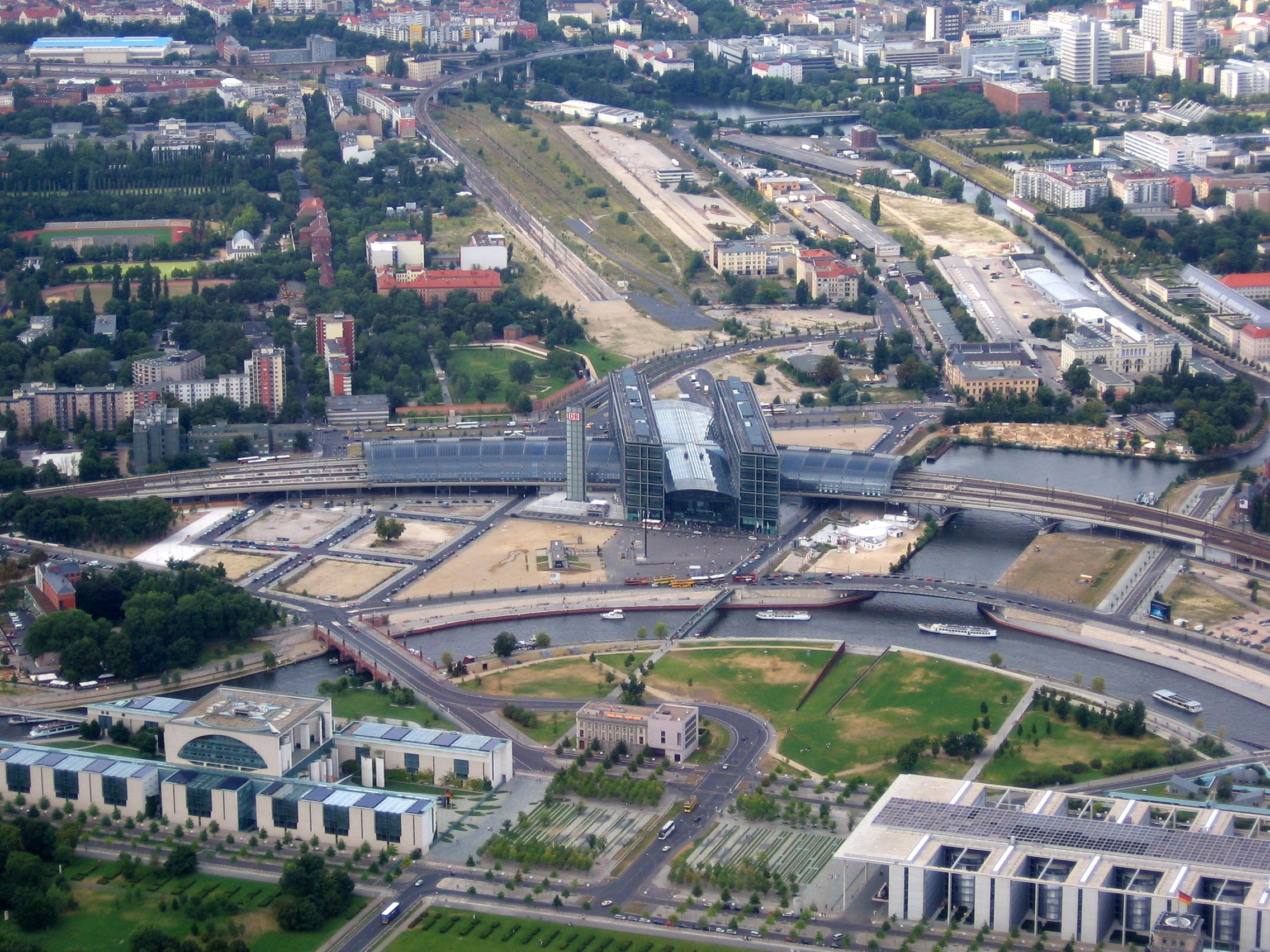 Blick auf den Berliner Hauptbahnhof vom Helikopter aus mit Bundeskanzleramt, Spreebogenpark, Paul-Löbe-Haus, Moltkebrücke, Schweizer Botschaft (alte provisorische Umgehungsstraße bis Anfang 2019), Hamburger Bahnhof